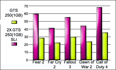 Graafik kaadrisageduste kohta erinevates mängudes nii ühe kui ka kahe videokaardiga